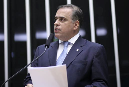 Paulo Abi-Ackel no microfone